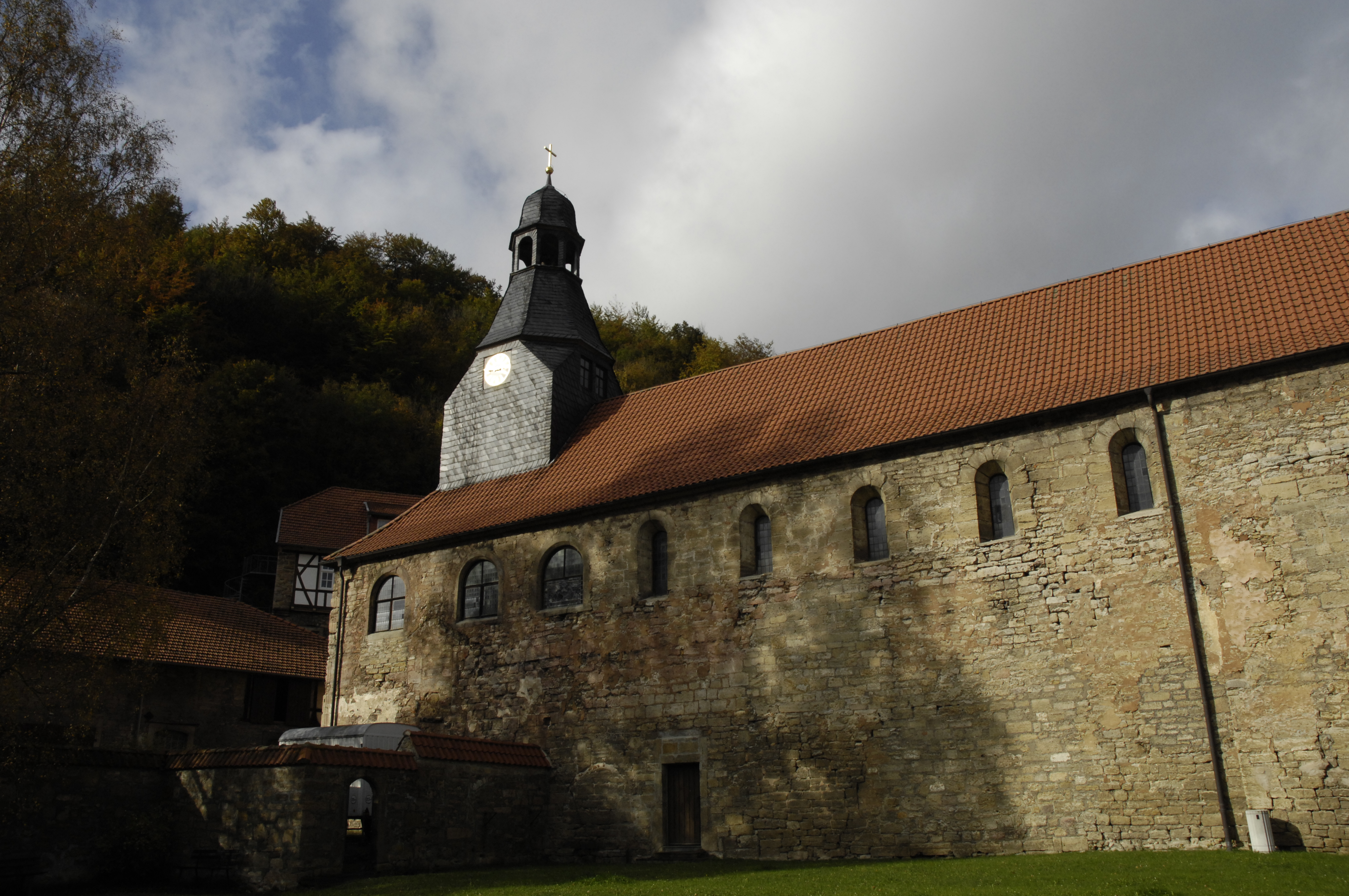 Kloster Zella, schlichte Klosterkirche